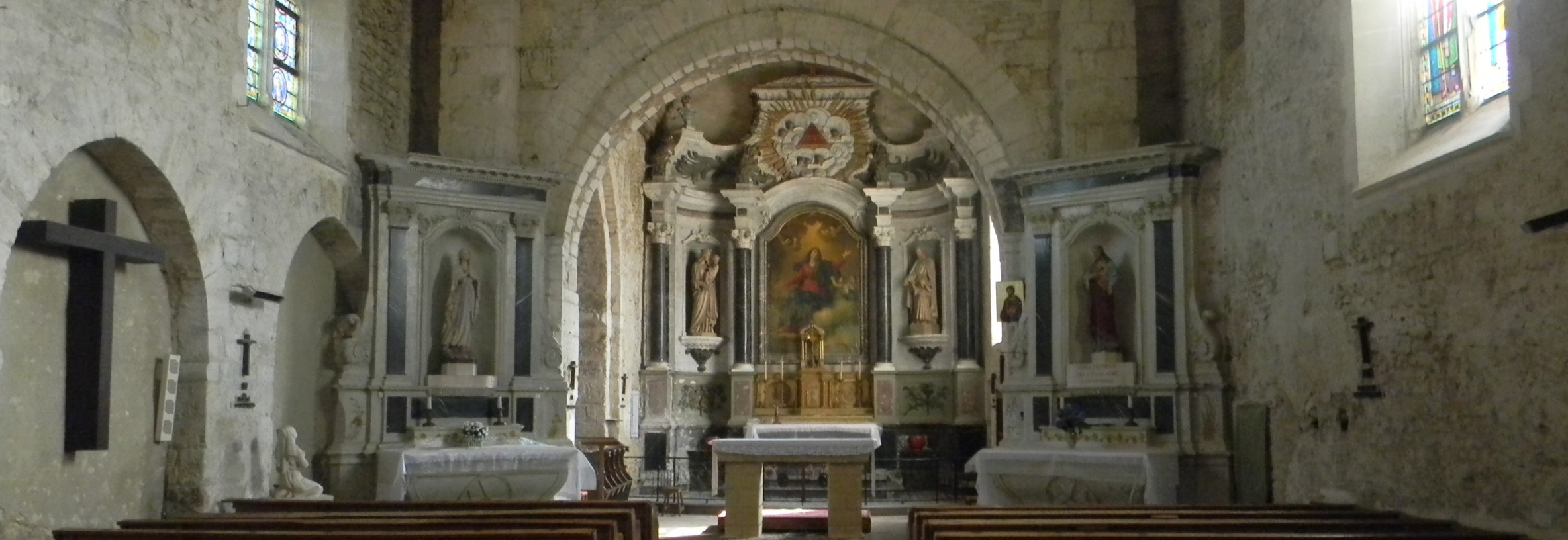 Chœur de l'église romane de Brissarthe, l'autel est de style-tombeau, érigé au XVIIIè siècle. Le tableau central semble être une copie de Noël Coypel.